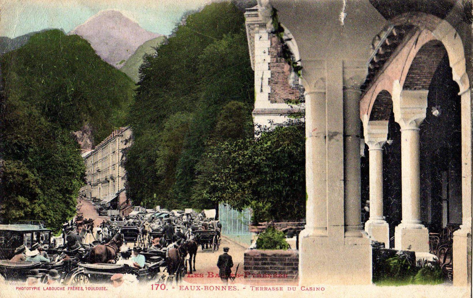 Vue de l'esplanade du casino, Eaux-Bonnes,Pyrénées Atlantiques, France.